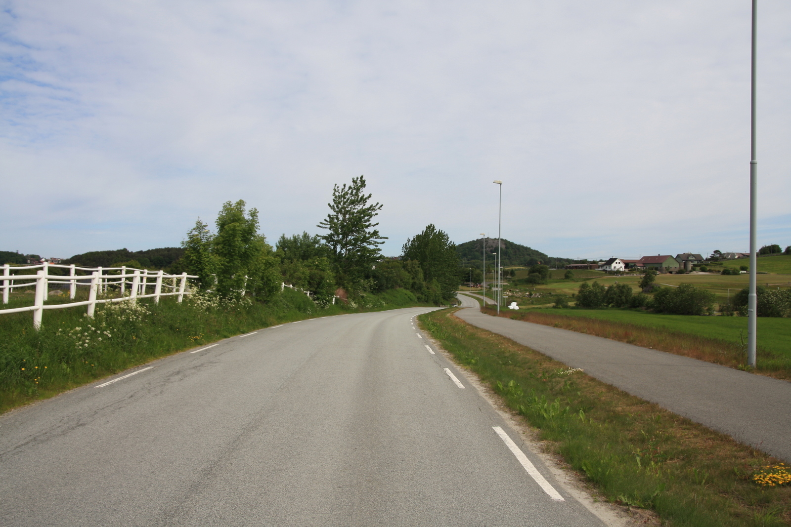 Fylkesvei 329 Bærheimsveien ved Sola Golfklubb